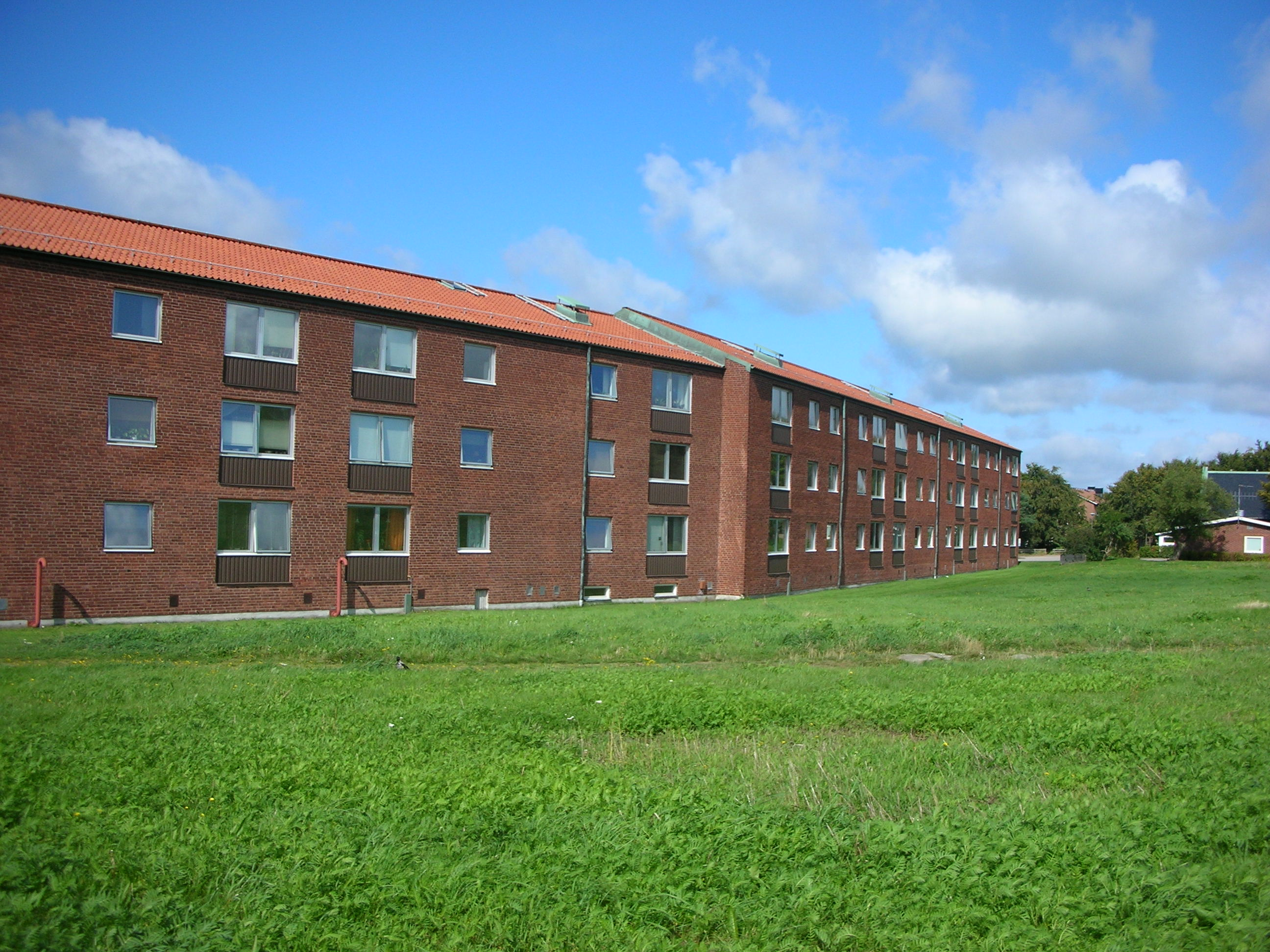 Bostadsområdet Brunnsberg i Varberg.